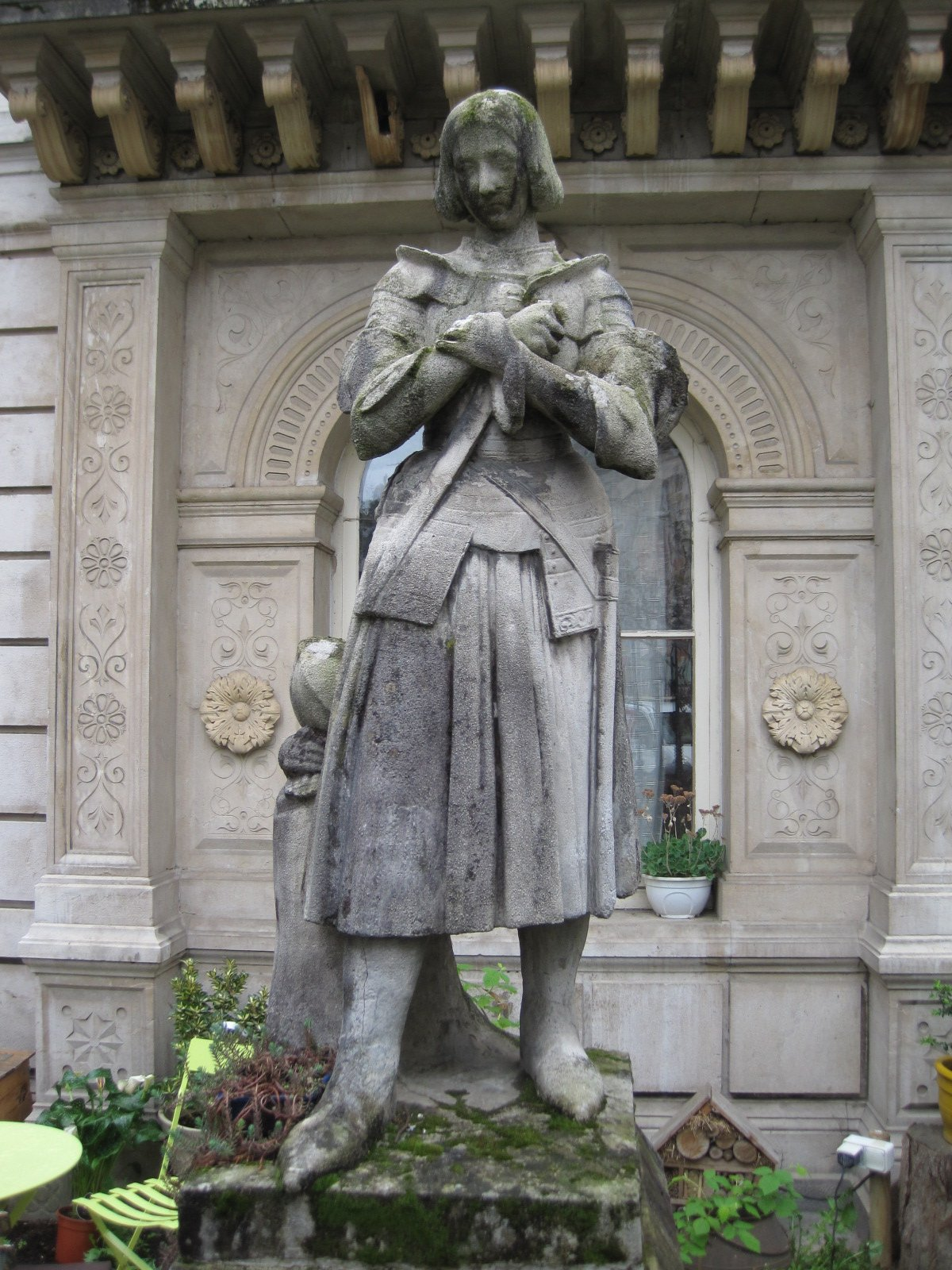 Le Magasin de Sel de Besançon - Statue de Jeanne d'Arc, d'après l'original (1837, Versailles) de Marie d'Orléans.